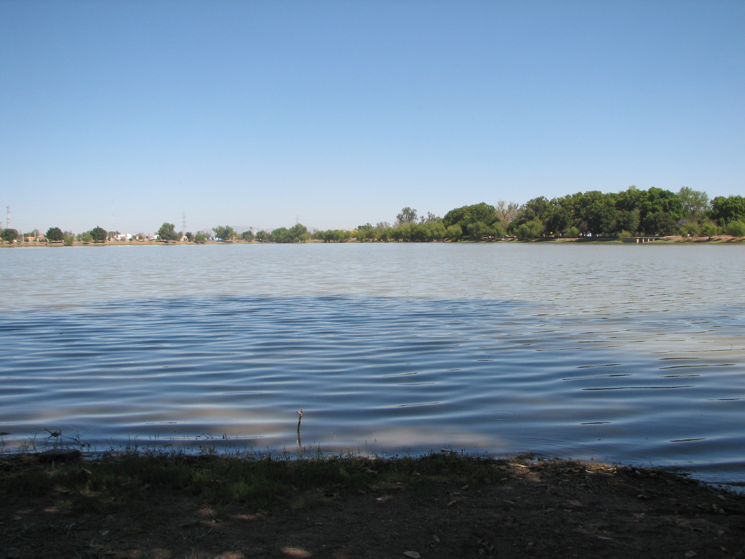 Laguna del Nainari en Cd. Obregon